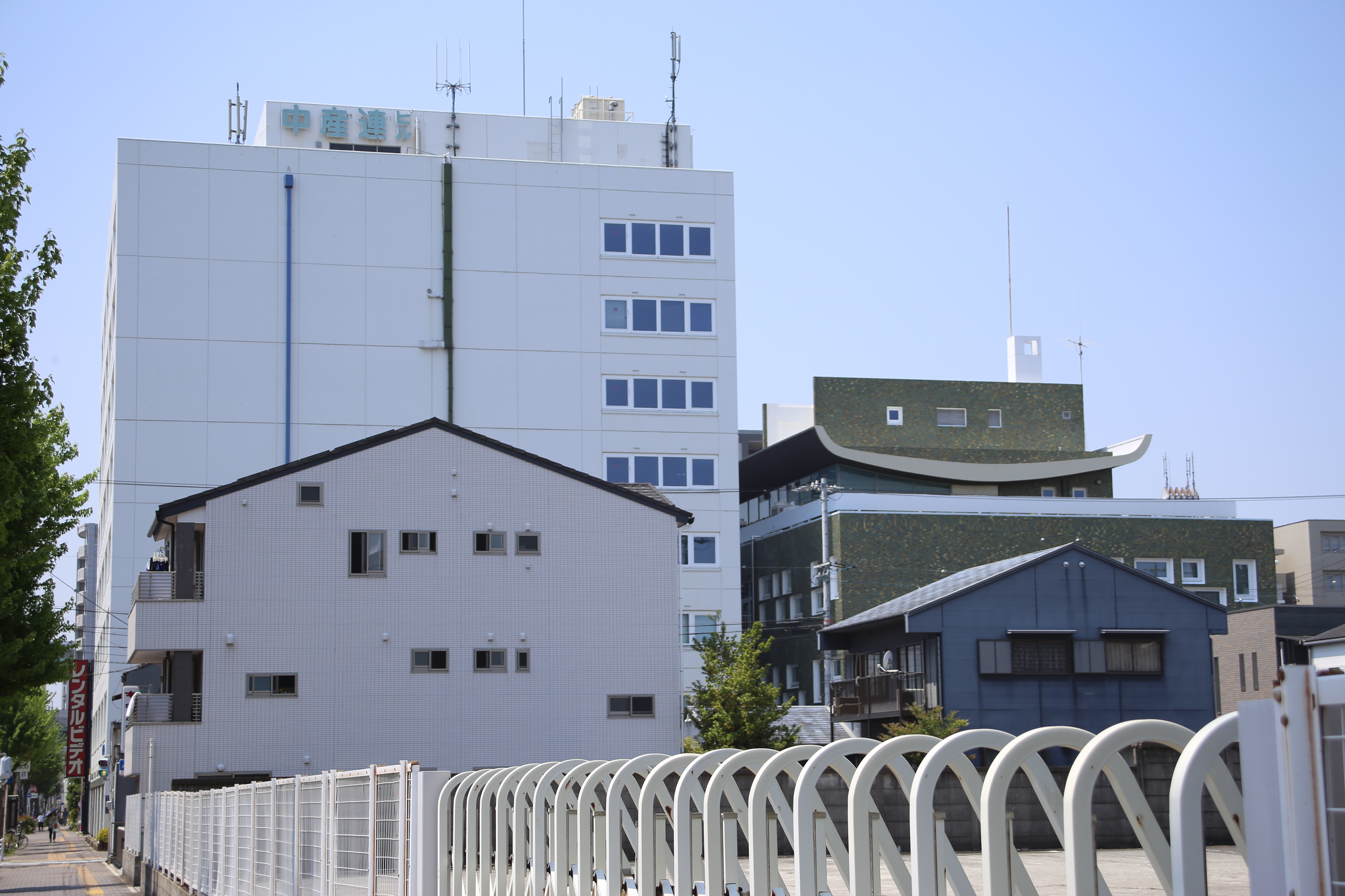 名古屋市東区白壁三丁目の中産連ビル（左が新館・右が本館）を南側公道東側より撮影